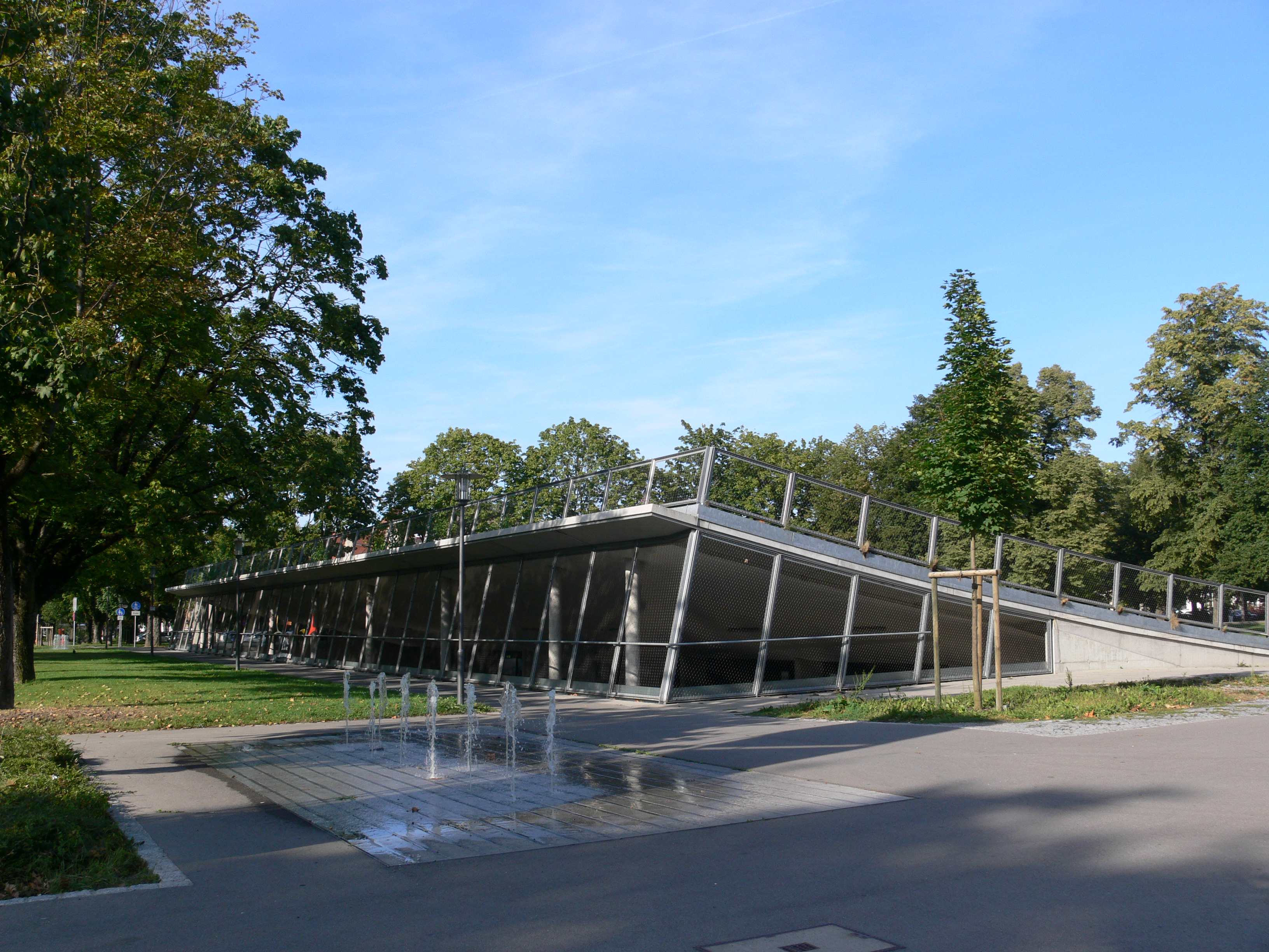 Weingarten (Württemberg), Stadtgarten Tiefgarage (Straßenseite)